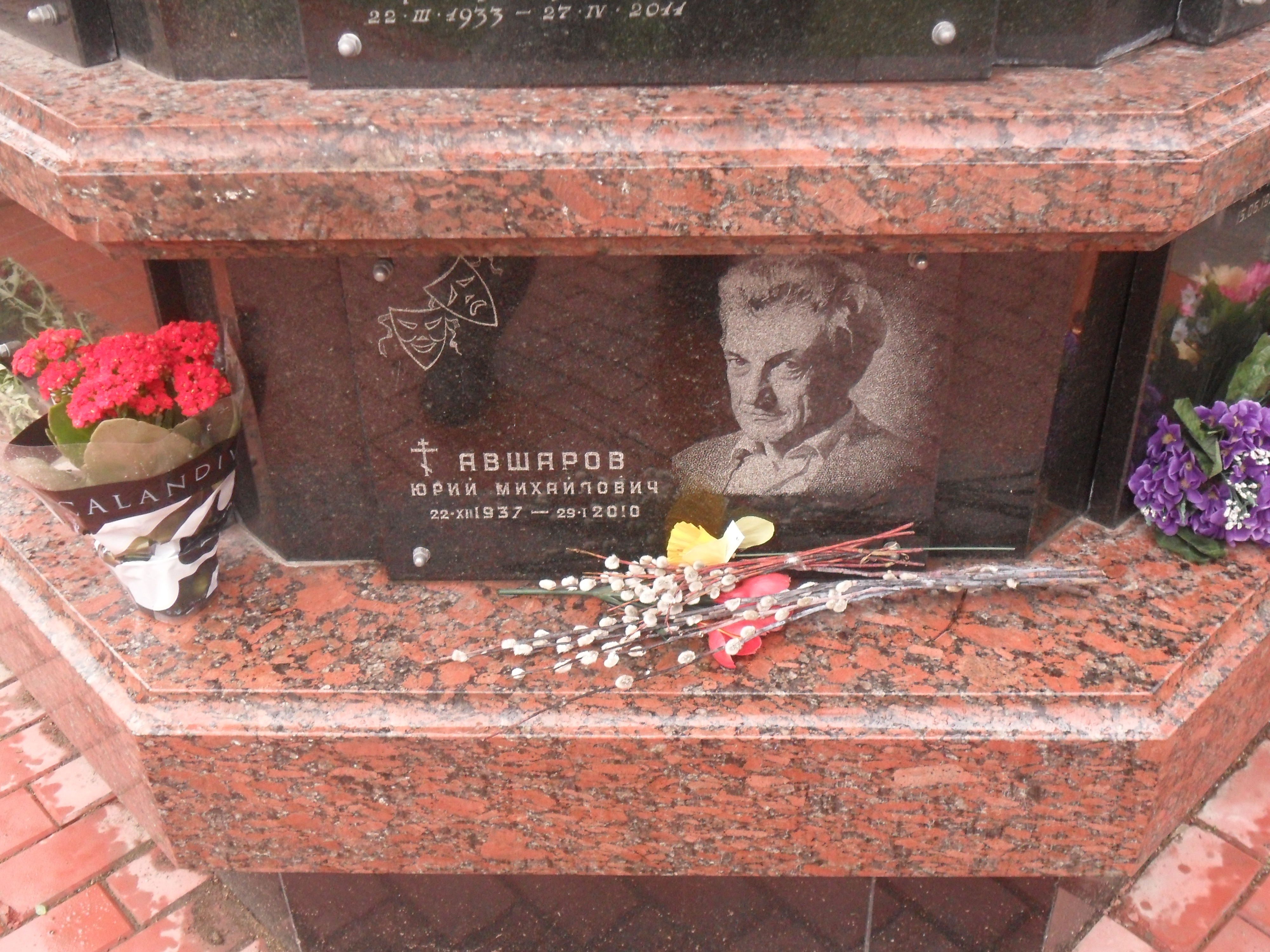 Плита колумбария Ваганьковского кладбища, где находится прах Народного артиста РФ Юрия Авшарова.